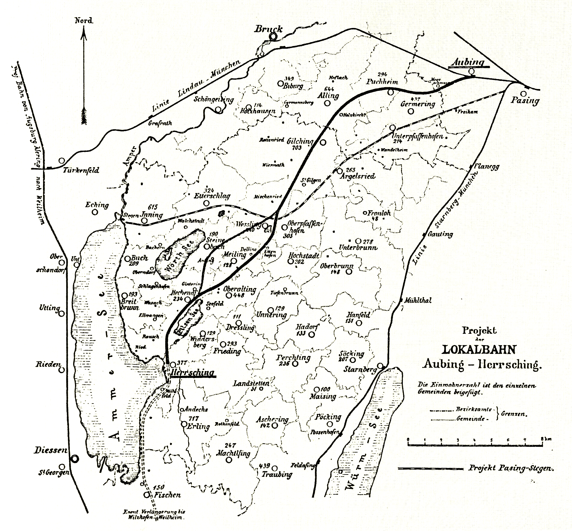 Streckenprojekte Pasing–Stegen (gestrichelt) und Aubing–Herrsching (fett) mit Varianten im Bereich von Steinebach und der nicht umgesetzten Verlängerung nach Wielenbach, Diskussionsstand 1895